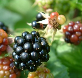 Brombeeren in den Vogesen